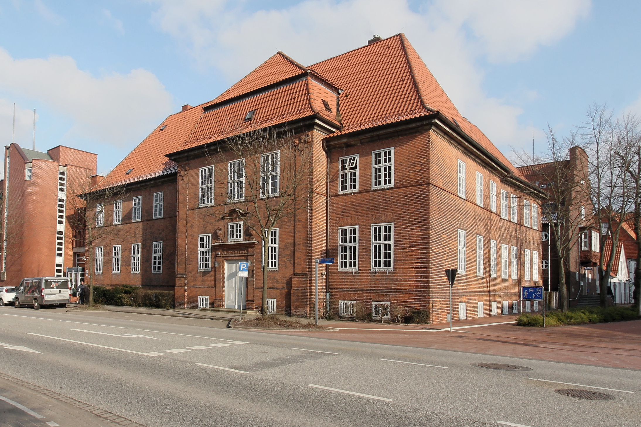 Eckernförde, Reeperbahn 47; Amtsgericht